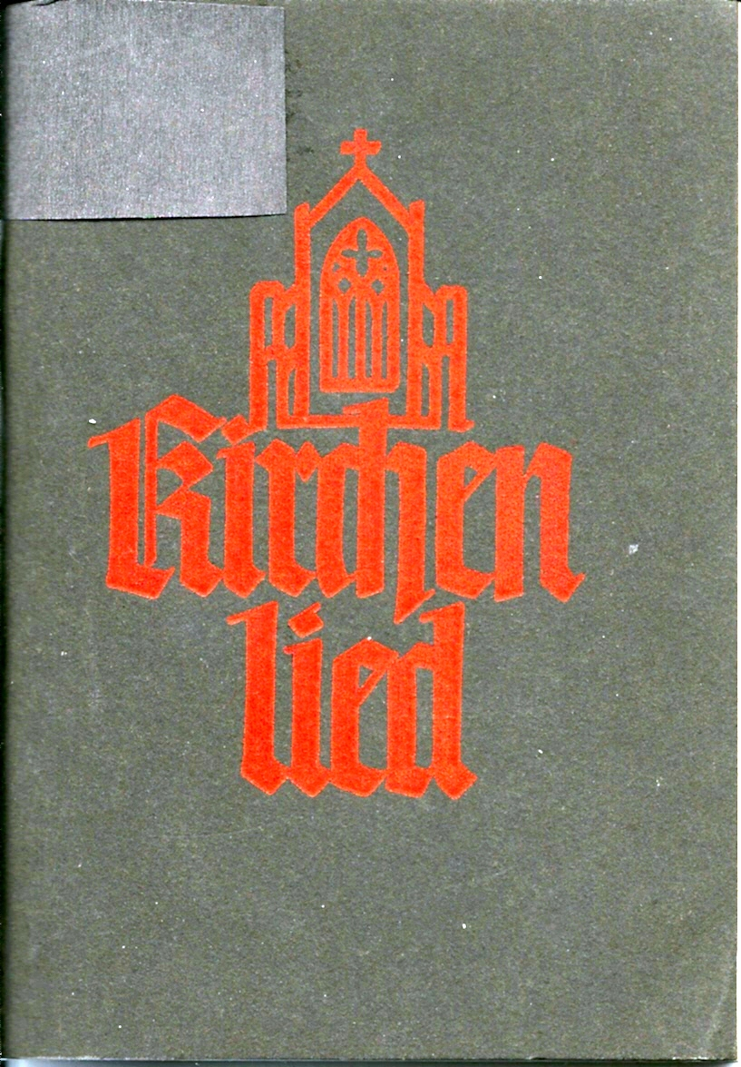 Kirchenlied. Eine Auslese geistlicher Lieder für die Jugend, Düsseldorf 1938, Textausgabe, 2. Auflage 1938 (Titelseite)